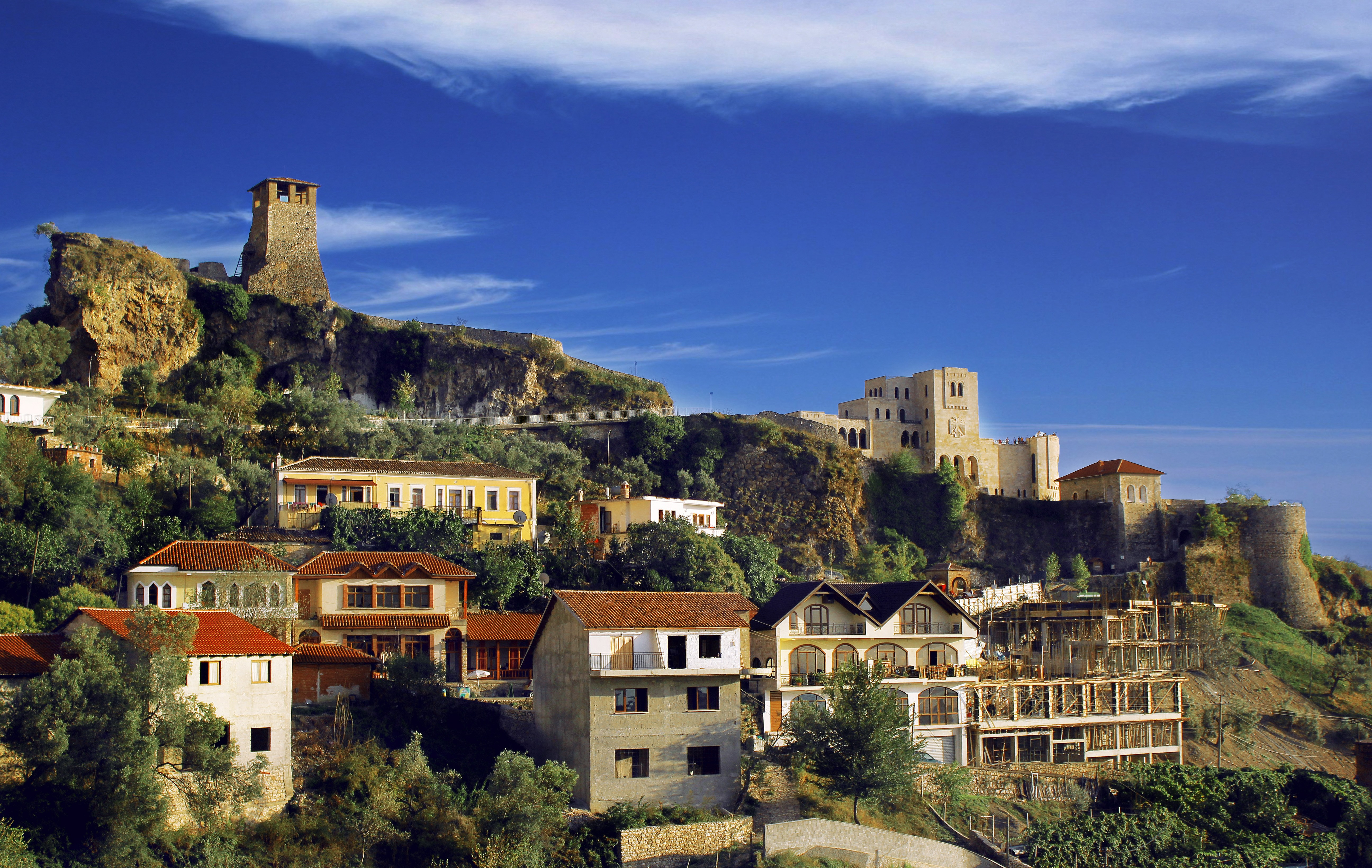 Kalaja e Krujes